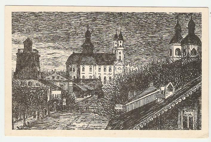 Беларуская (тарашкевіца): Пінск (Pinsk), вуліца Лагішынская (vulica Łahišynskaja)